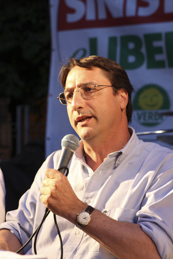 La festa di Sinistra e Libertà